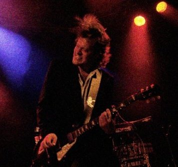 Søren Zahle Schou spiller 2007 med UTAH på Danmarks Smukkeste Festival i Skanderborg.